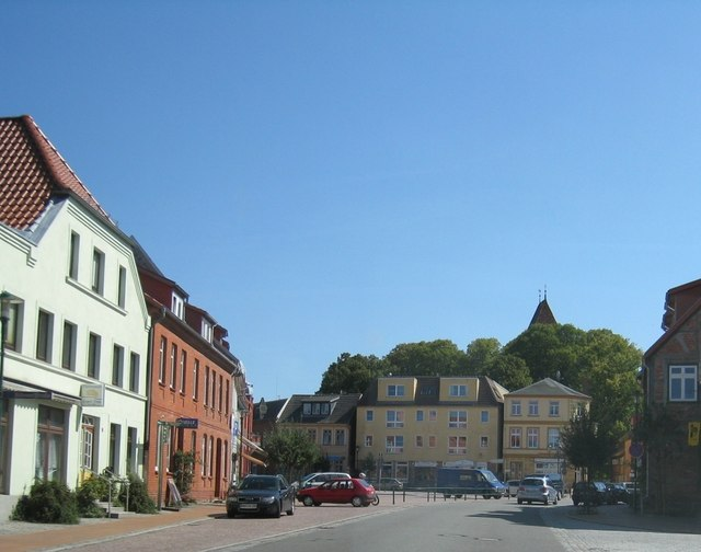 Marktplatz - Rehna